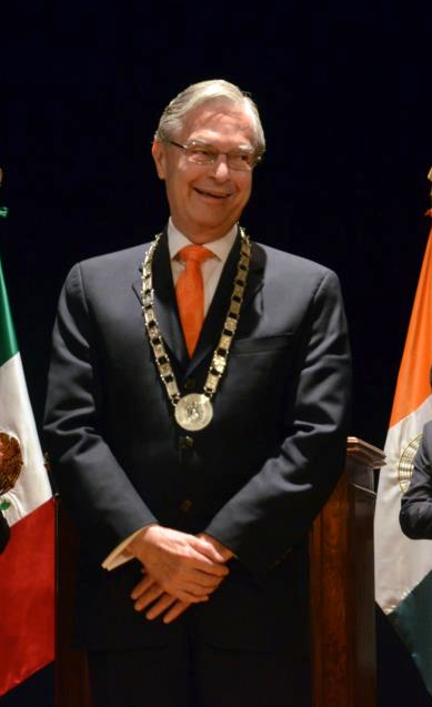 El Dr. Luis Ernesto Derbez Bautista recibió la investidura de parte del Patronato y el Consejo Empresarial de la Fundación Universidad de las Américas Puebla, para continuar dirigiendo a la UDLAP para el periodo 2013 – 2018 con los derechos y obligaciones que el cargo le confiere.